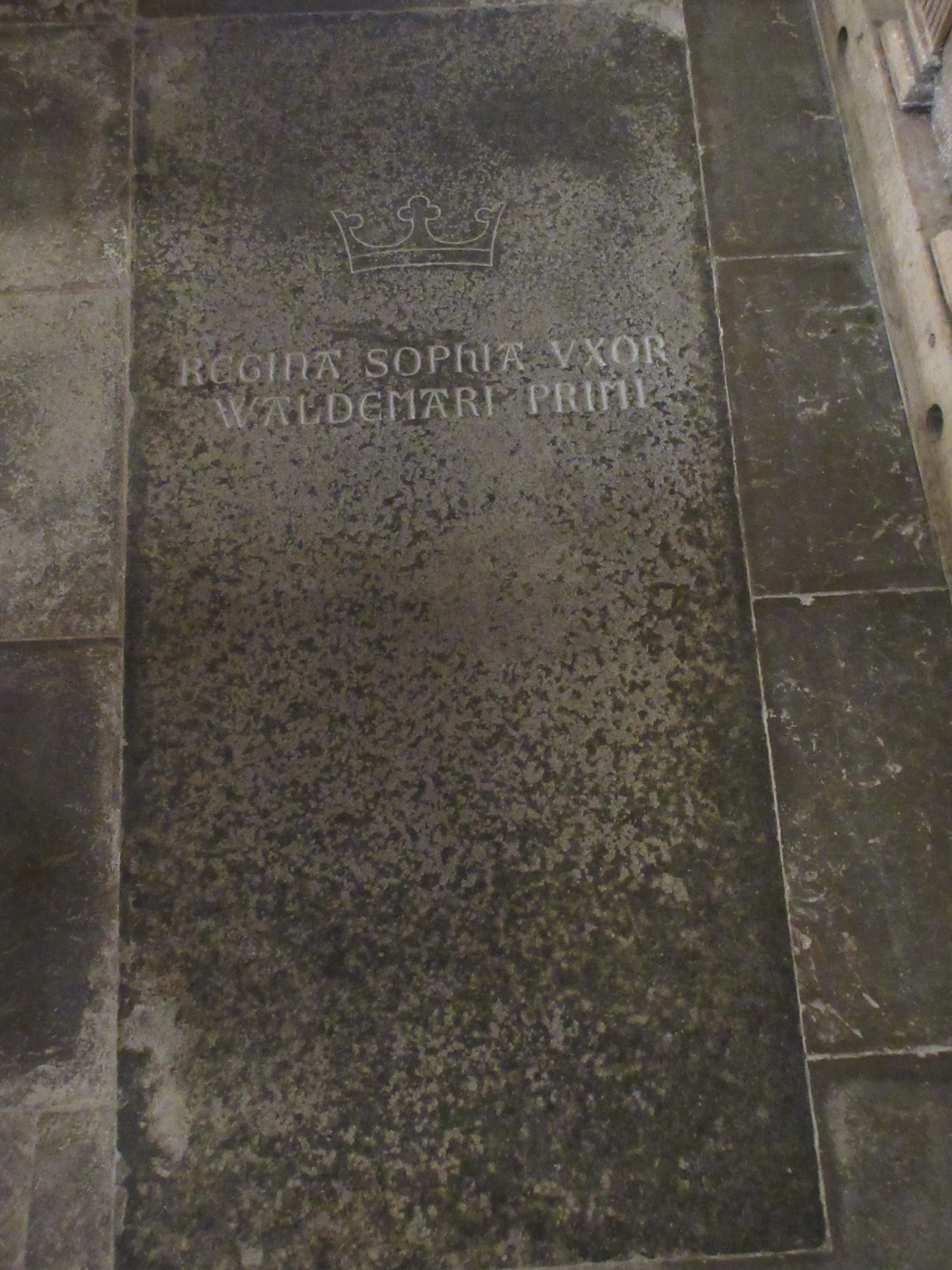 Dronning Sofias ligsten i Skt. Bendts Kirke i Ringsted. Dronning Sofia (død 1198) var gift med Valdemar d. Store.